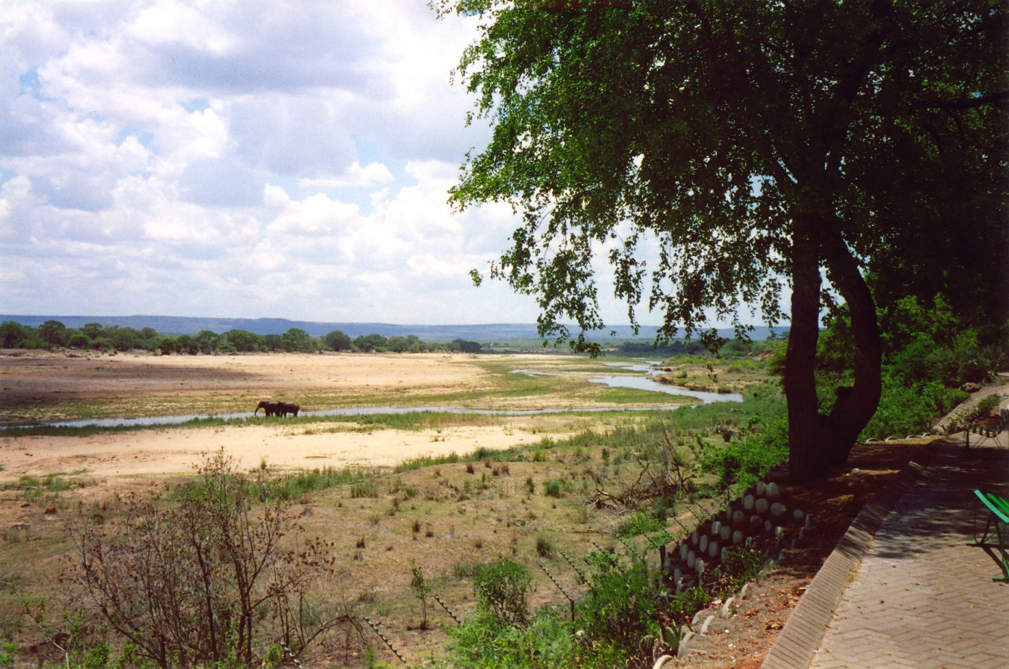 Letaba